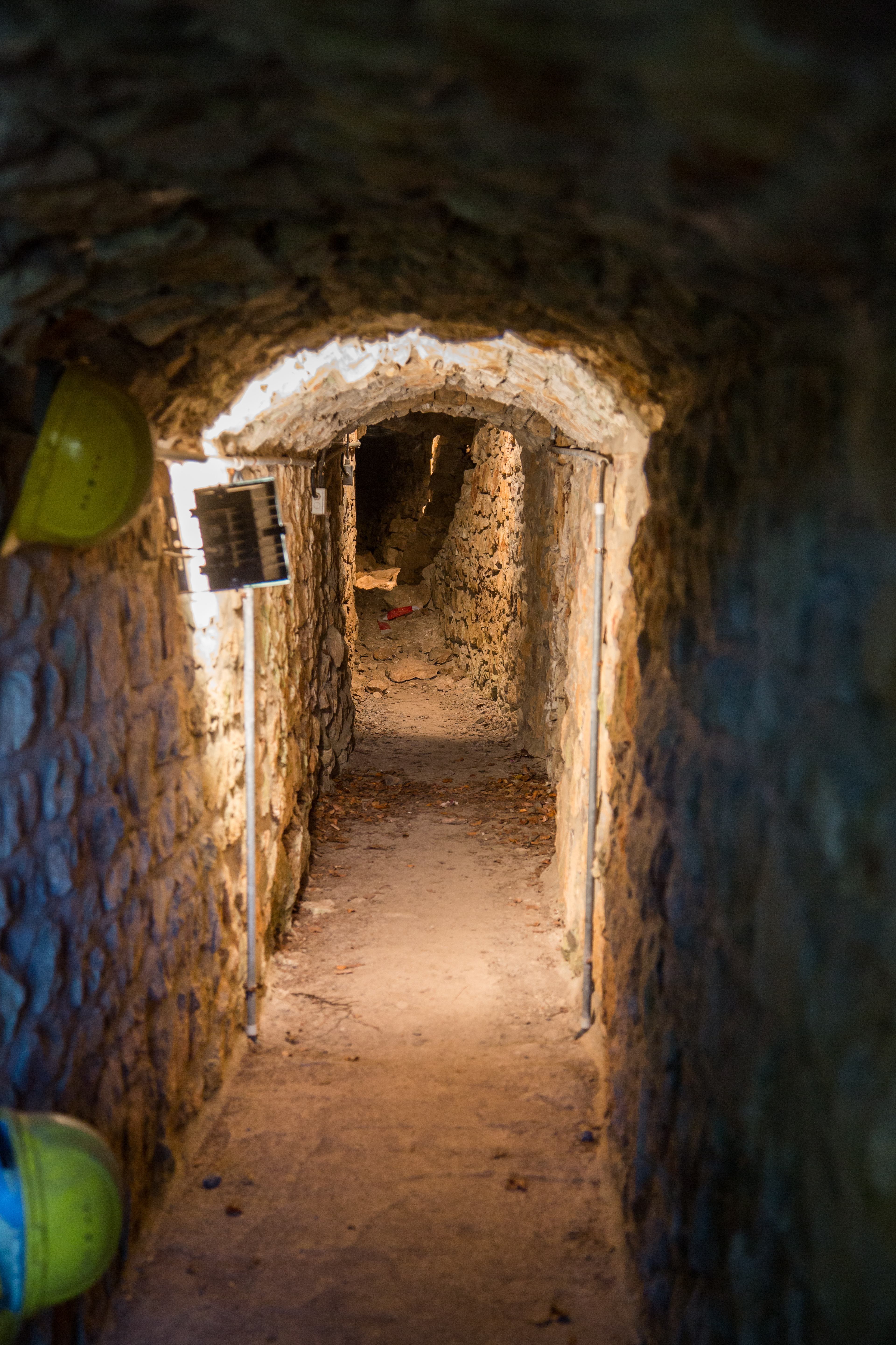 Tiergarten-Tunnel in Blankenheim, Blick vom Tunneleingang bei Burg Blankenheim